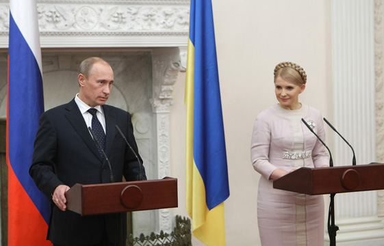 По итогам российско-украинских переговоров и заседания Комитета по вопросам экономического сотрудничества В.В.Путин и Ю.В.Тимошенко провели совместную пресс-конференцию